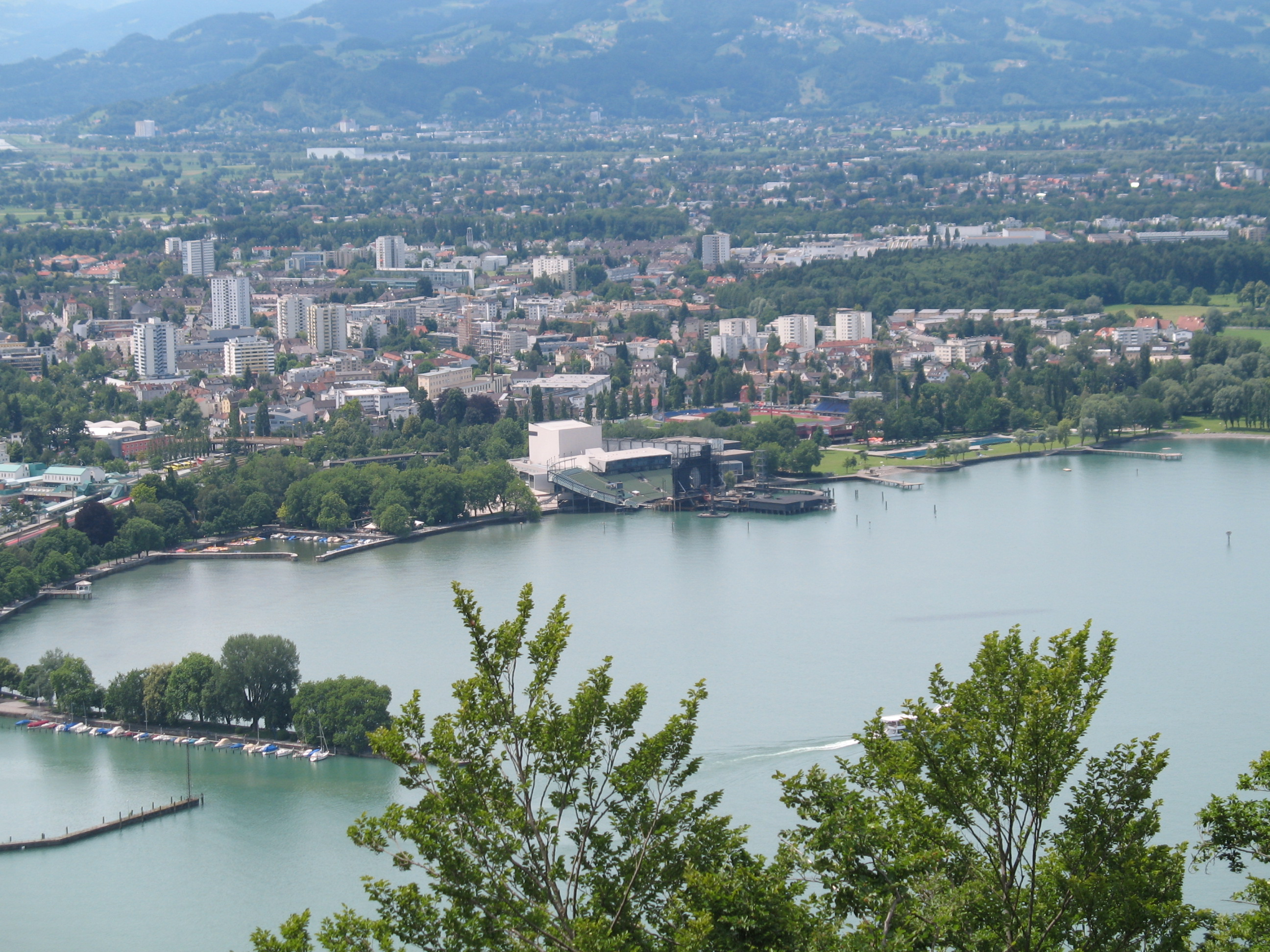 Bregenz: Seebühne vom Pfänder aus gesehen